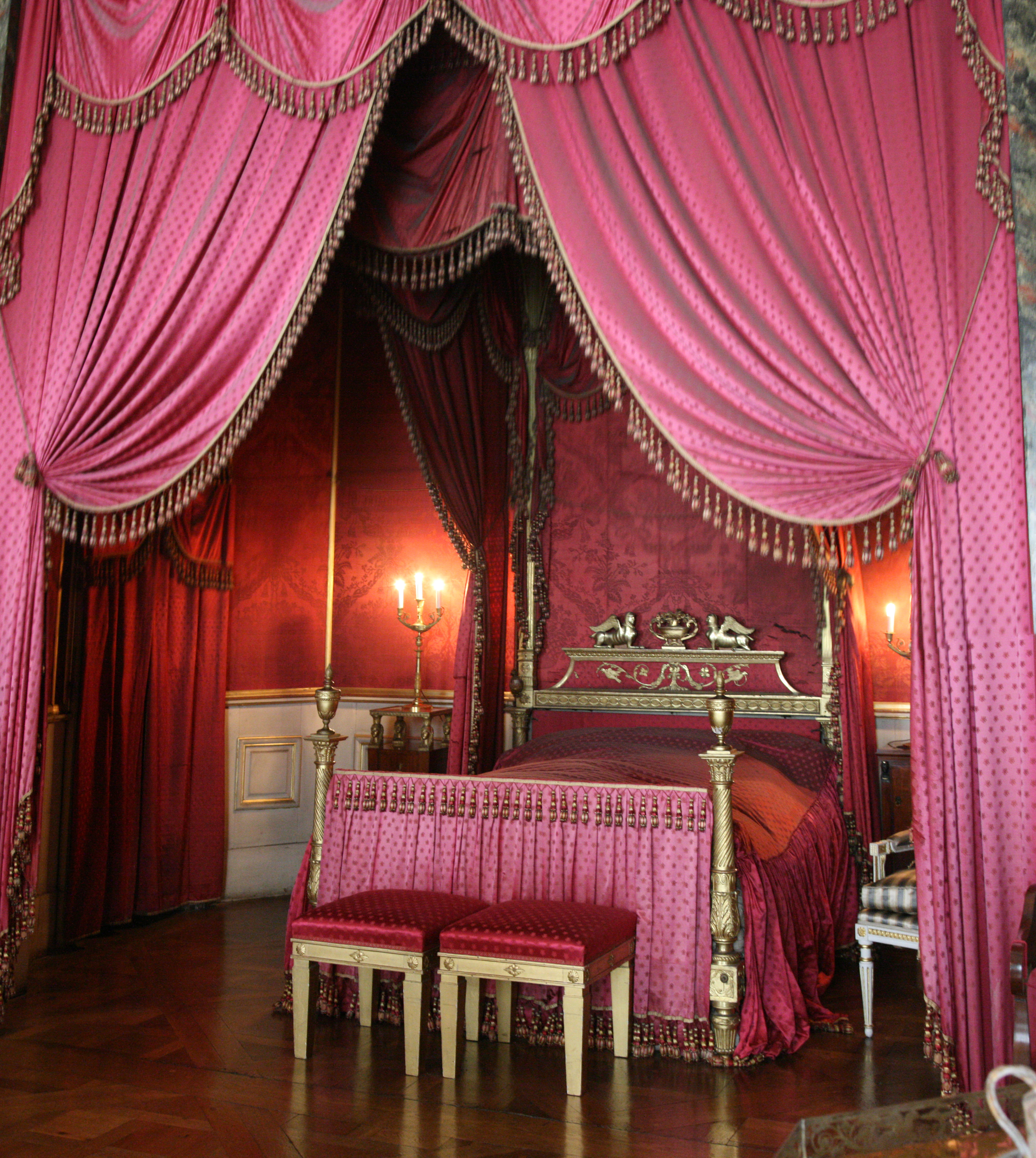 Schlafgemach der Königin Charlotte Mathilde im Residenzschloss Ludwigsburg